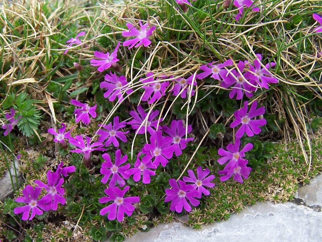 Primula minima (pl. pierwiosnek maleńki), habitat: atra Mountains, Hala Upłaz